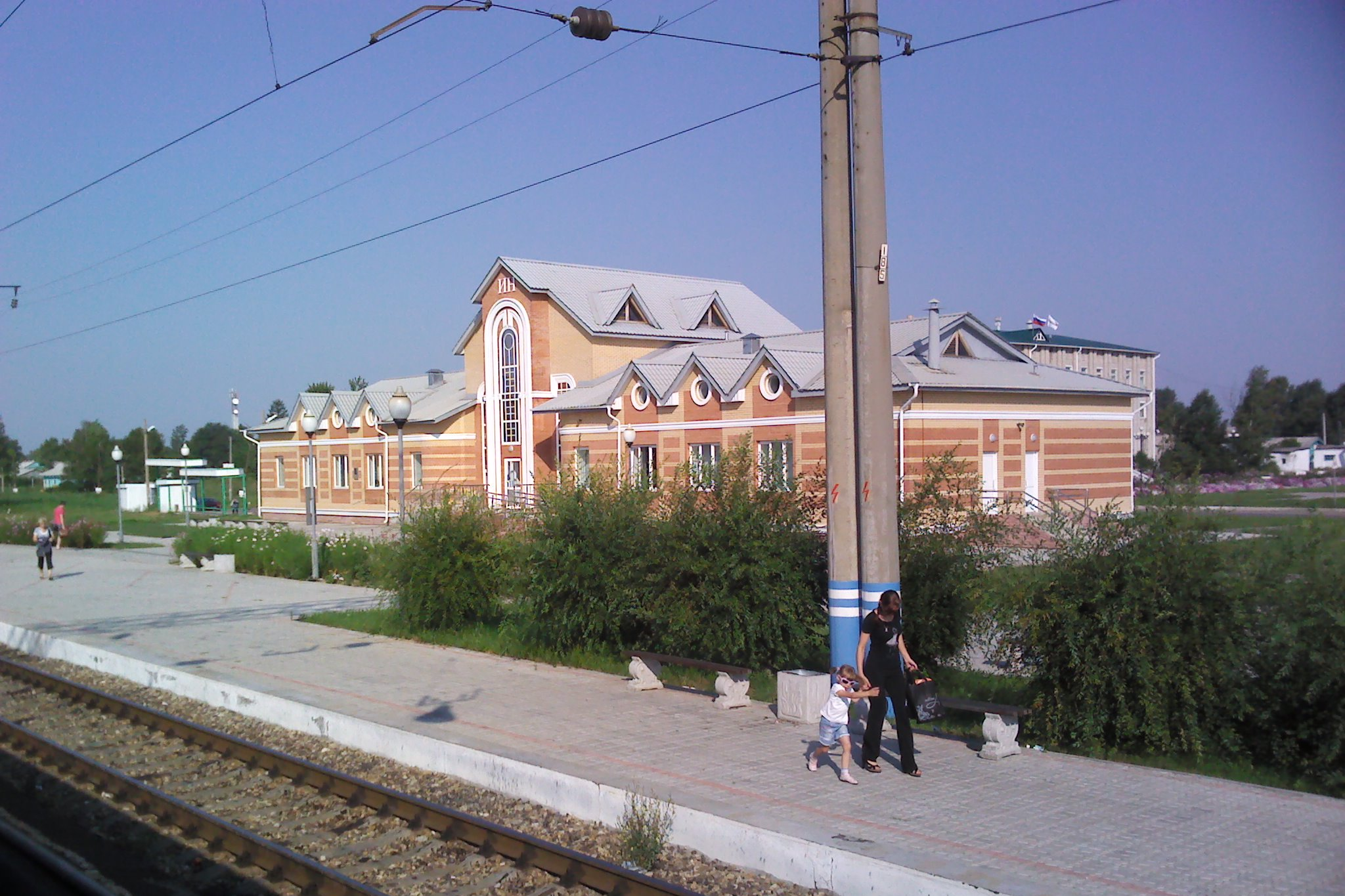 Вокзал станции Ин (посёлок Смидович) Еврейской Автономной области, Россия